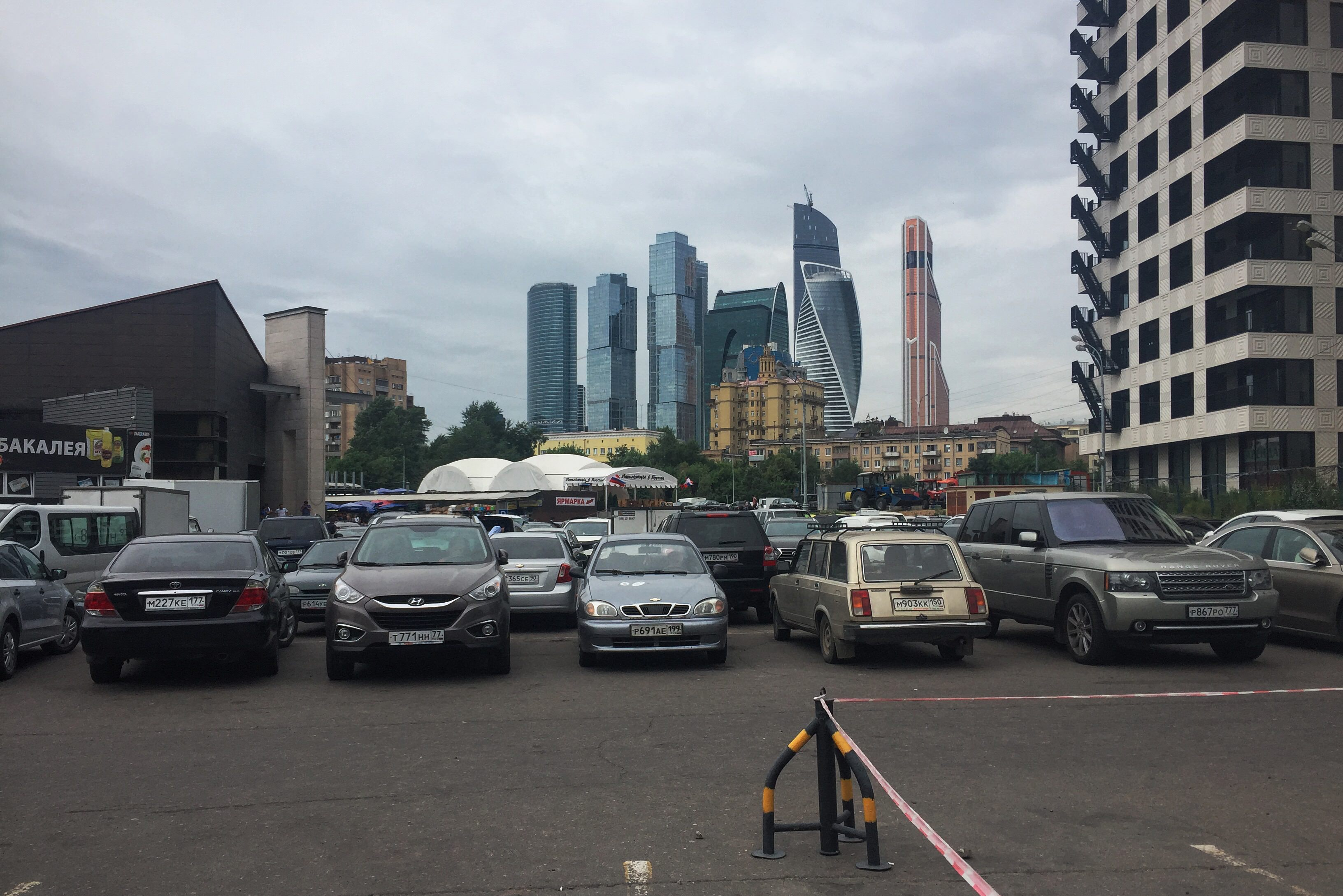 Можайский Вал. Слева от парковки Дорогомиловский рынок, справа БЦ Атлантик